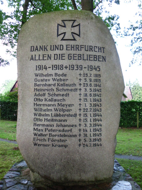 Dank und Ehrfurcht allen die Geblieben 1914-1918 + 1939-1945